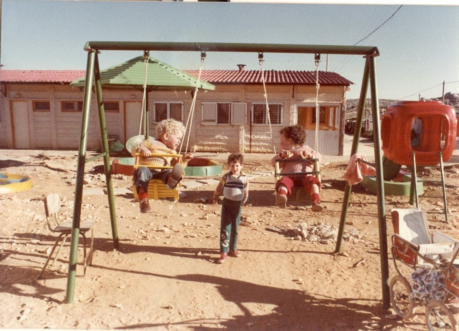 ילדי עפרה בשנותיה הראשונות בגן המשחקים